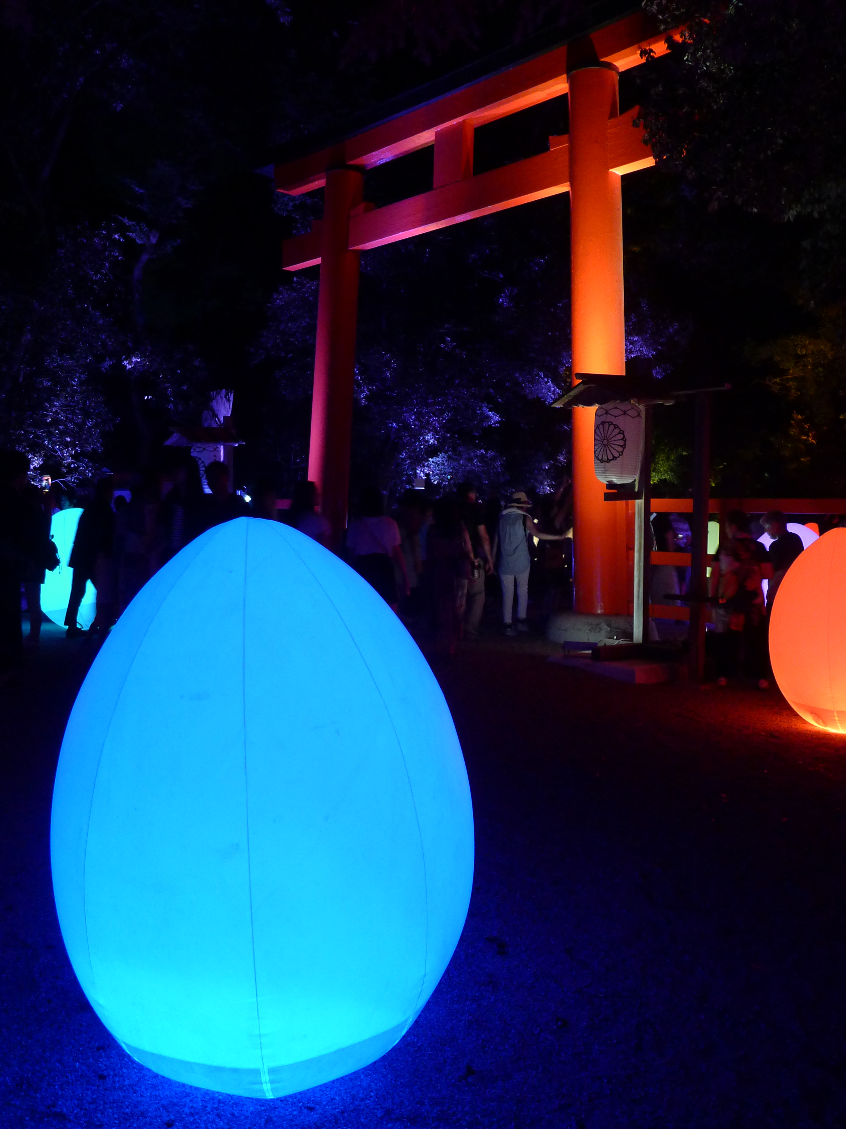 世界遺産・下鴨神社 糺の森の光の祭「TOKIO インカラミ」。主催者により撮影・公開自由。